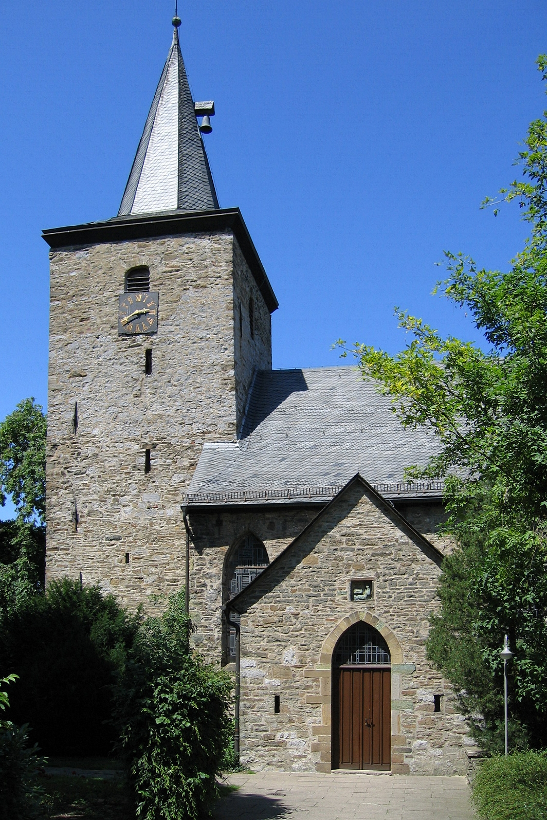 Stephanuskirche in Hemer-Deilinghofen (Germany)